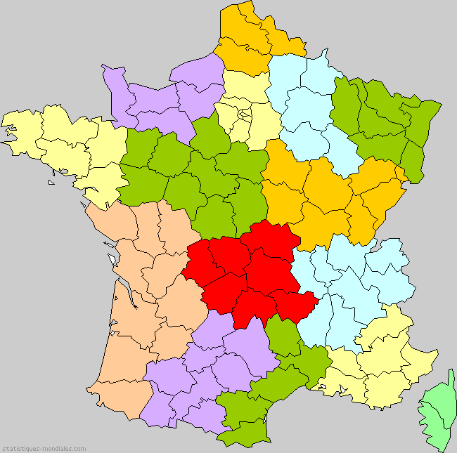 France - Proposition de découpage régional Balladur - 2010 - Source : J.M. Miossec, Géohistoire de la régionalisation en France : L’horizon régional, Quadrige/PUF, 2008